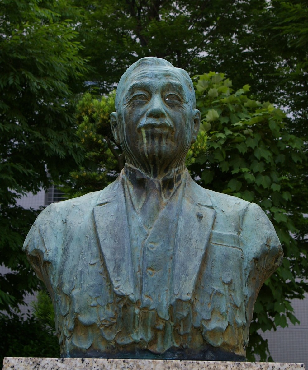 The statue set up in 1937. この像が建立されたのは1937年。商業目的のために設置されたものではない。鶴舞地区の一般人の立ち入りが認められる場所に、公衆に視認されることを前提に建てられている。